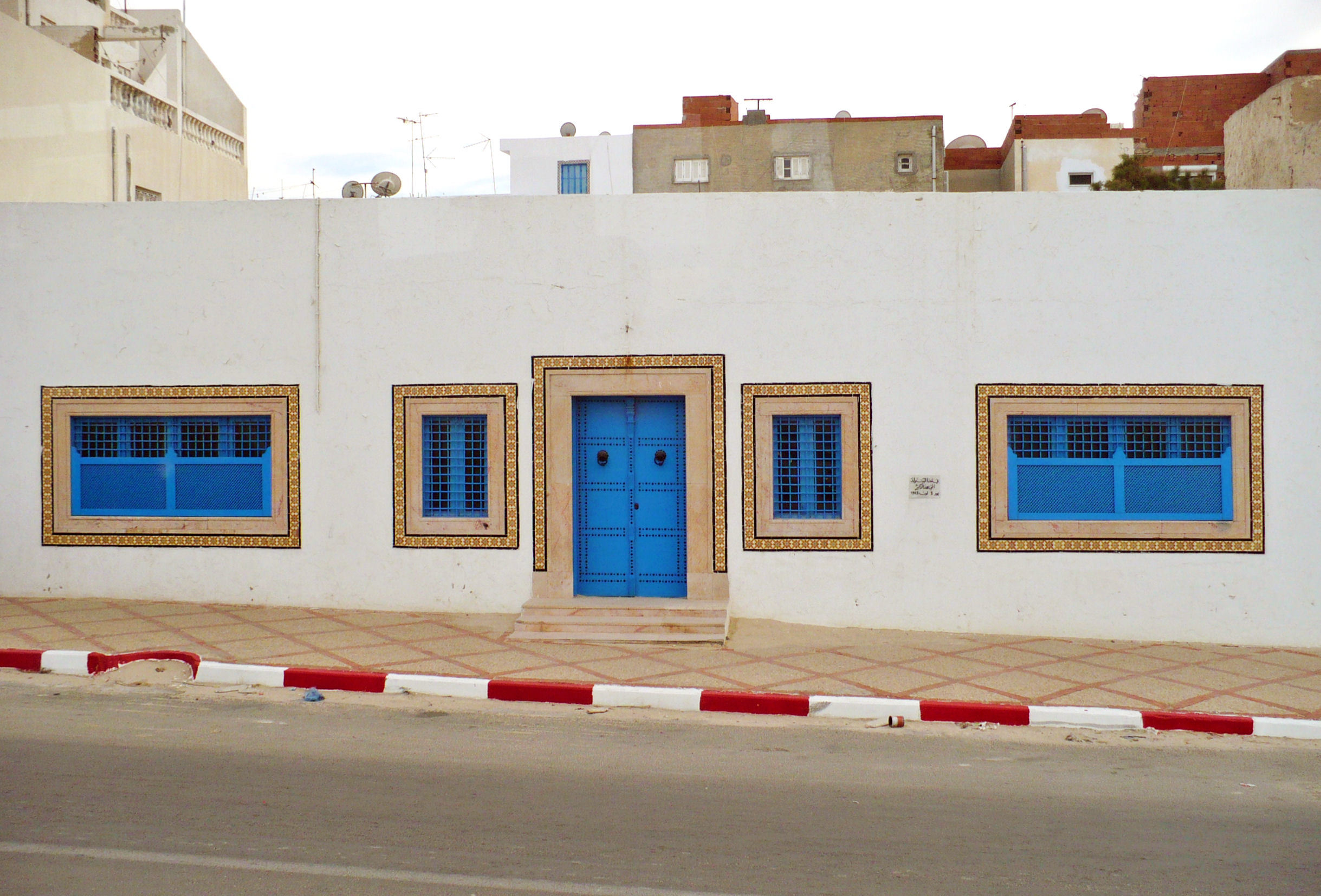 Tunezja, Monastyr, dom rodzinny prezydenta Habib Bourguiby